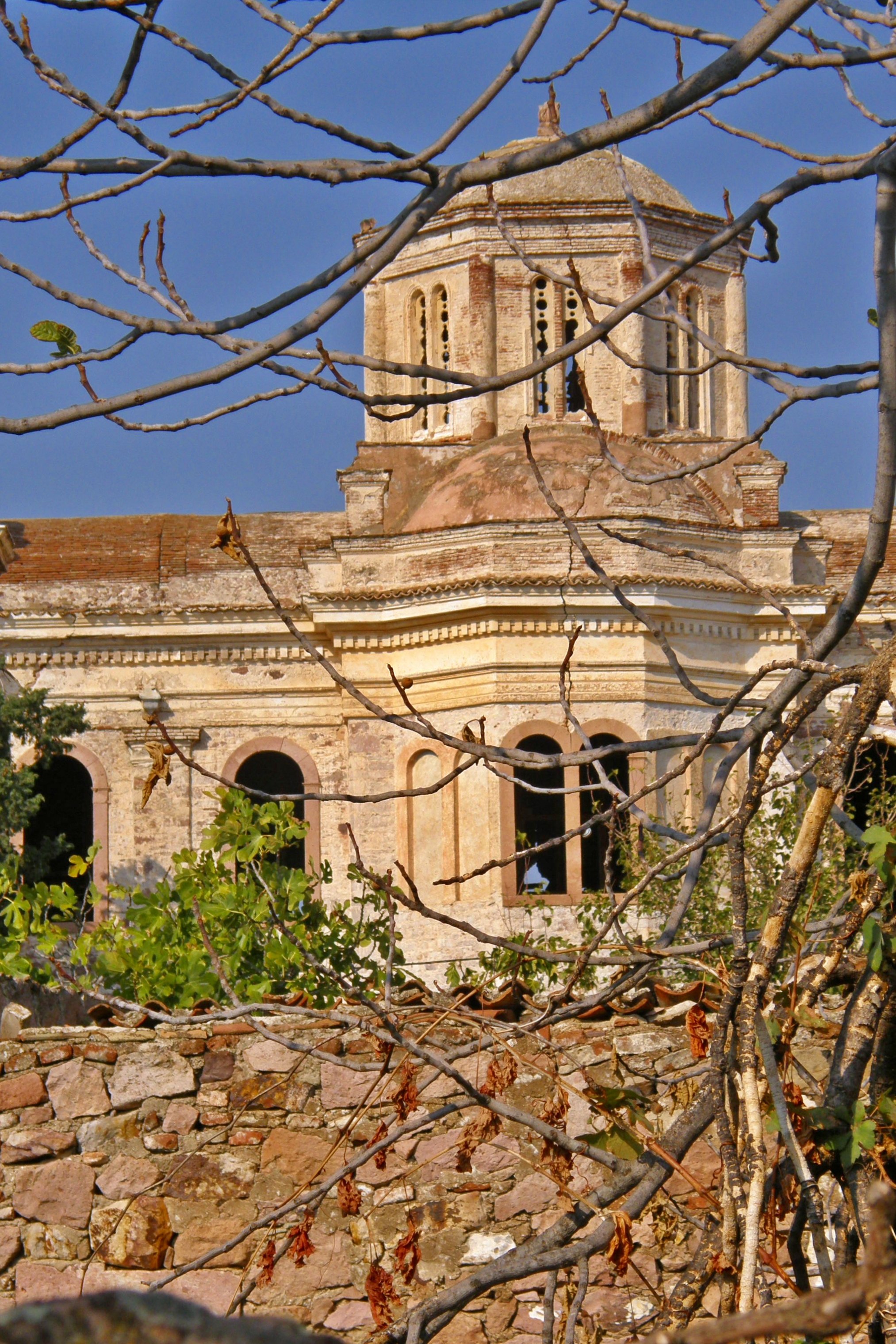 Église grecque en ruine sur l'ile d'Alibey (Cunda), province de Balıkesir, région de Marmara, Turquie